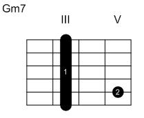 Eigenanfertigung